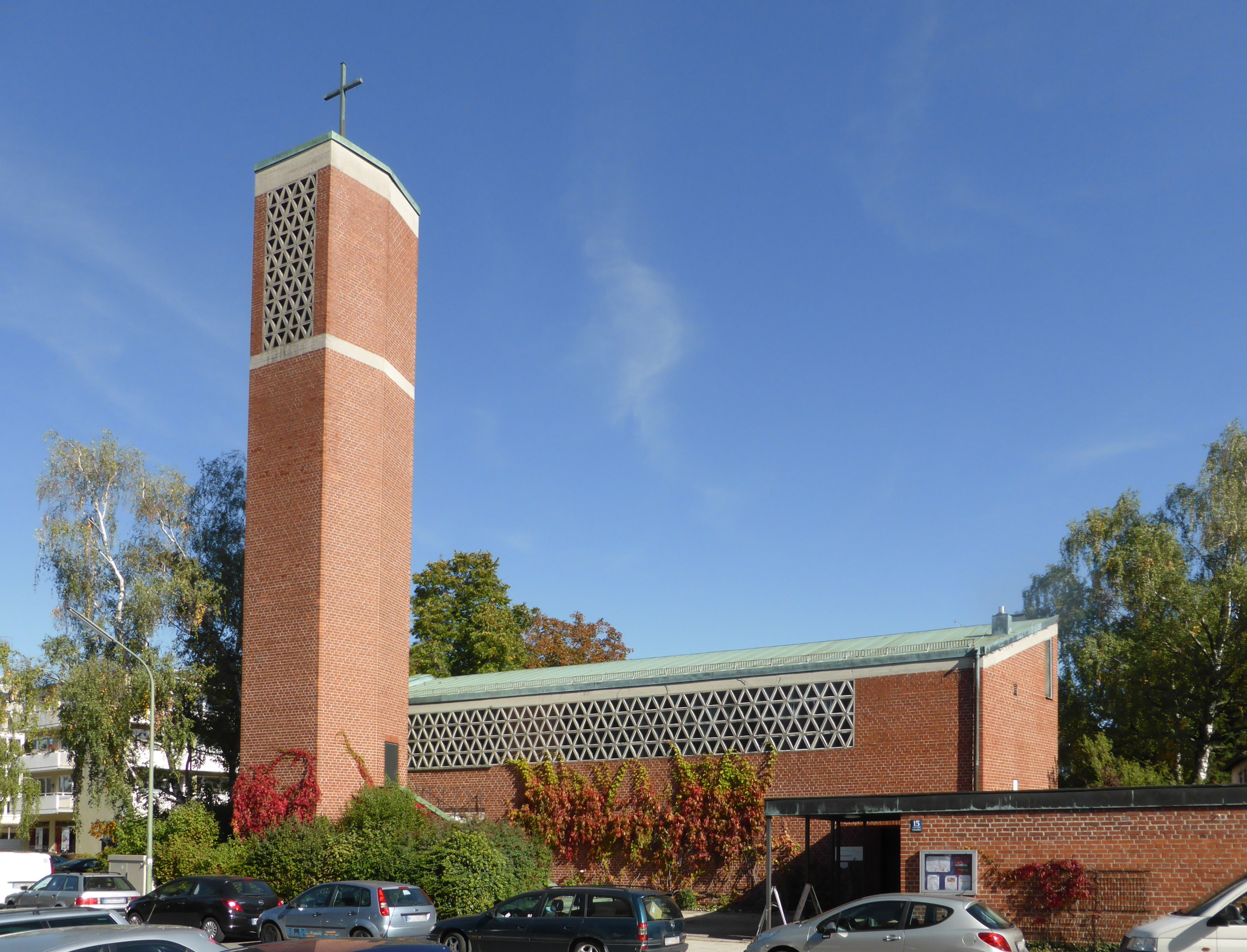 Offenbarungskirche in München Berg am Laim, Westseite.